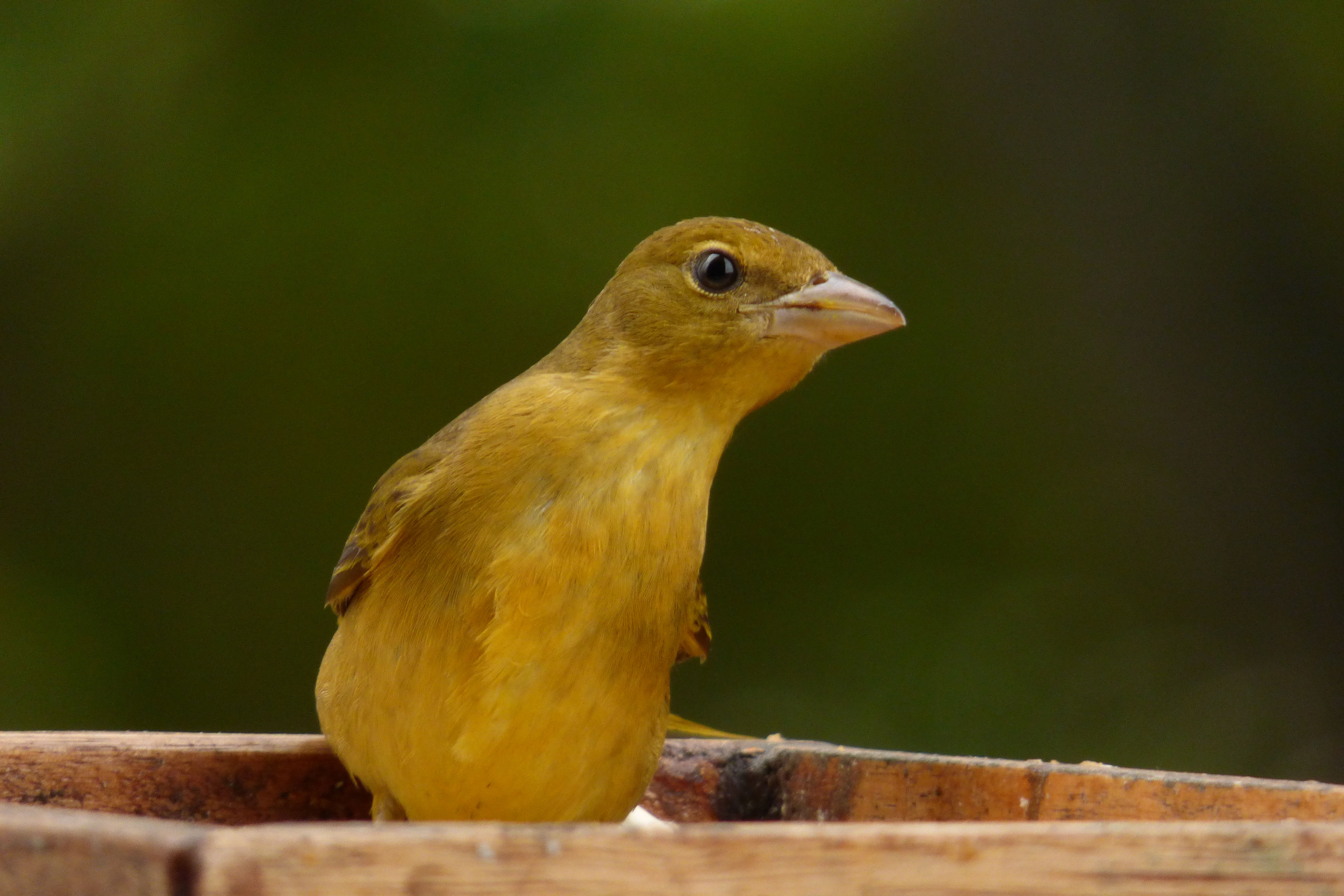 Piranga rubra (Piranga abejera) - Hembra